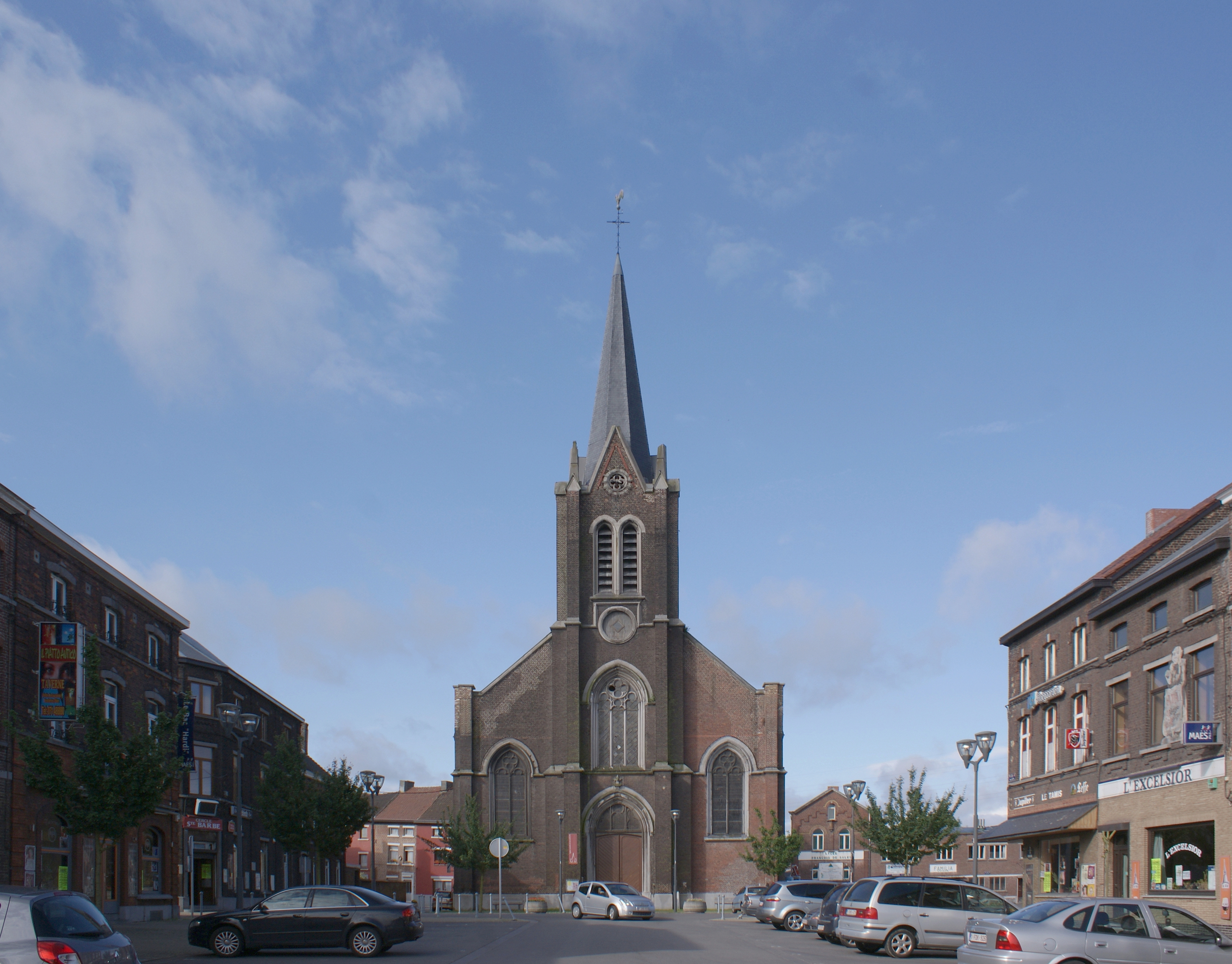 Sint-Barbarakerk (Gilly) - Voorgevel